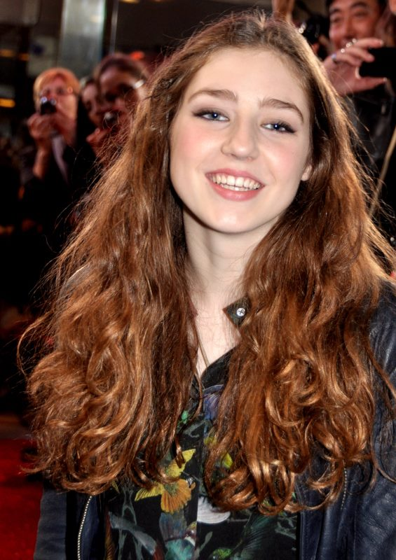 Birdy à l'enregistrement de "Champs-Elysées"